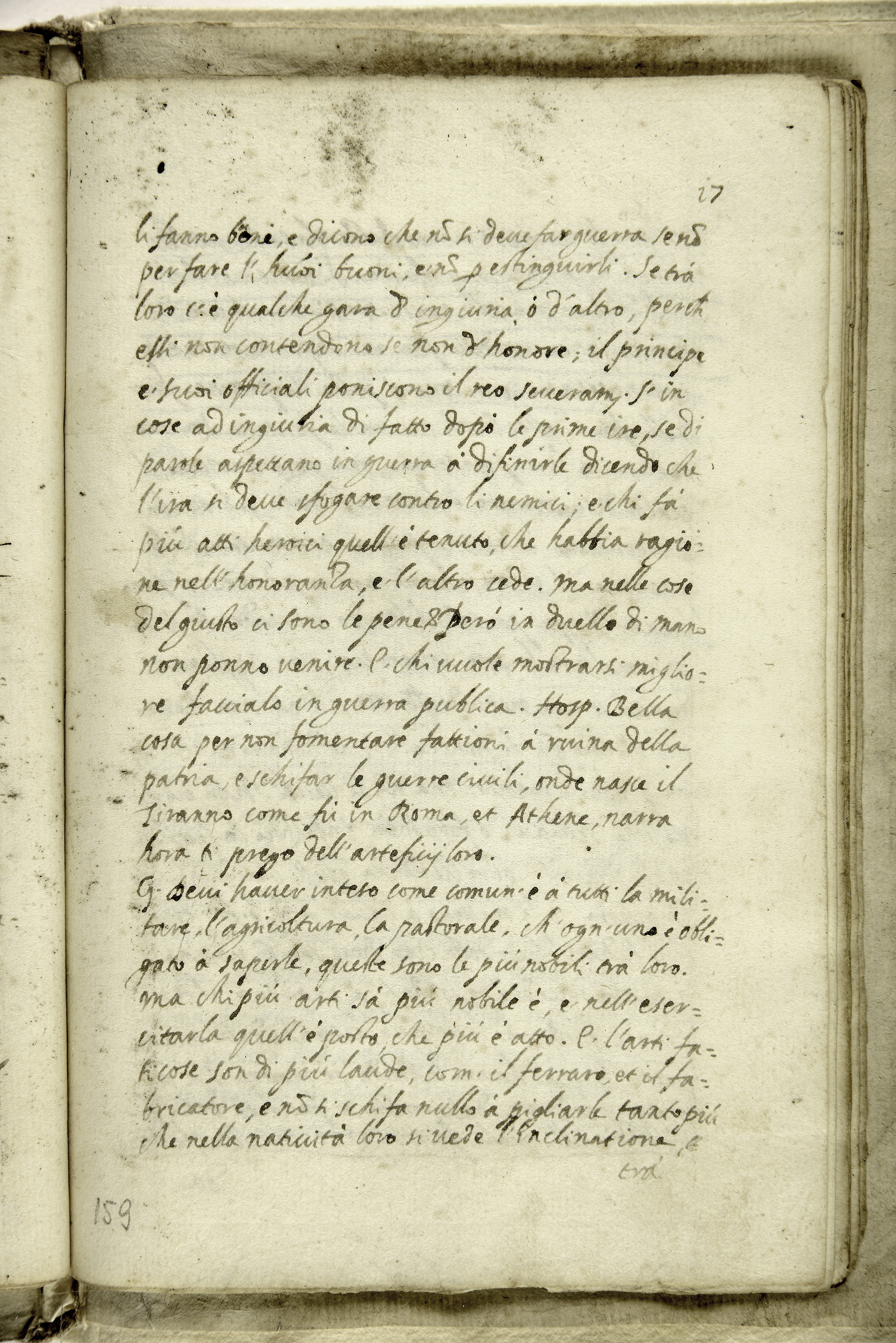 Pagina manoscritta de "La città del sole" di Tommaso Campanella (1602)